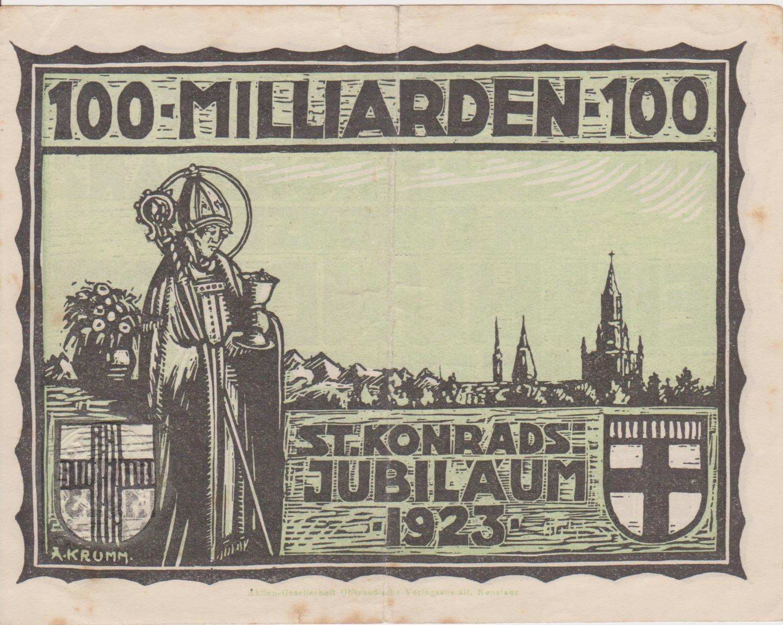 Deutschland (D) - Baden-Württemberg (BW) - Landkreis Konstanz (KN) - Konstanz: Notgeld-Schein der Stadt Konstanz, 100 Milliarden Mark (1923), Rückseite